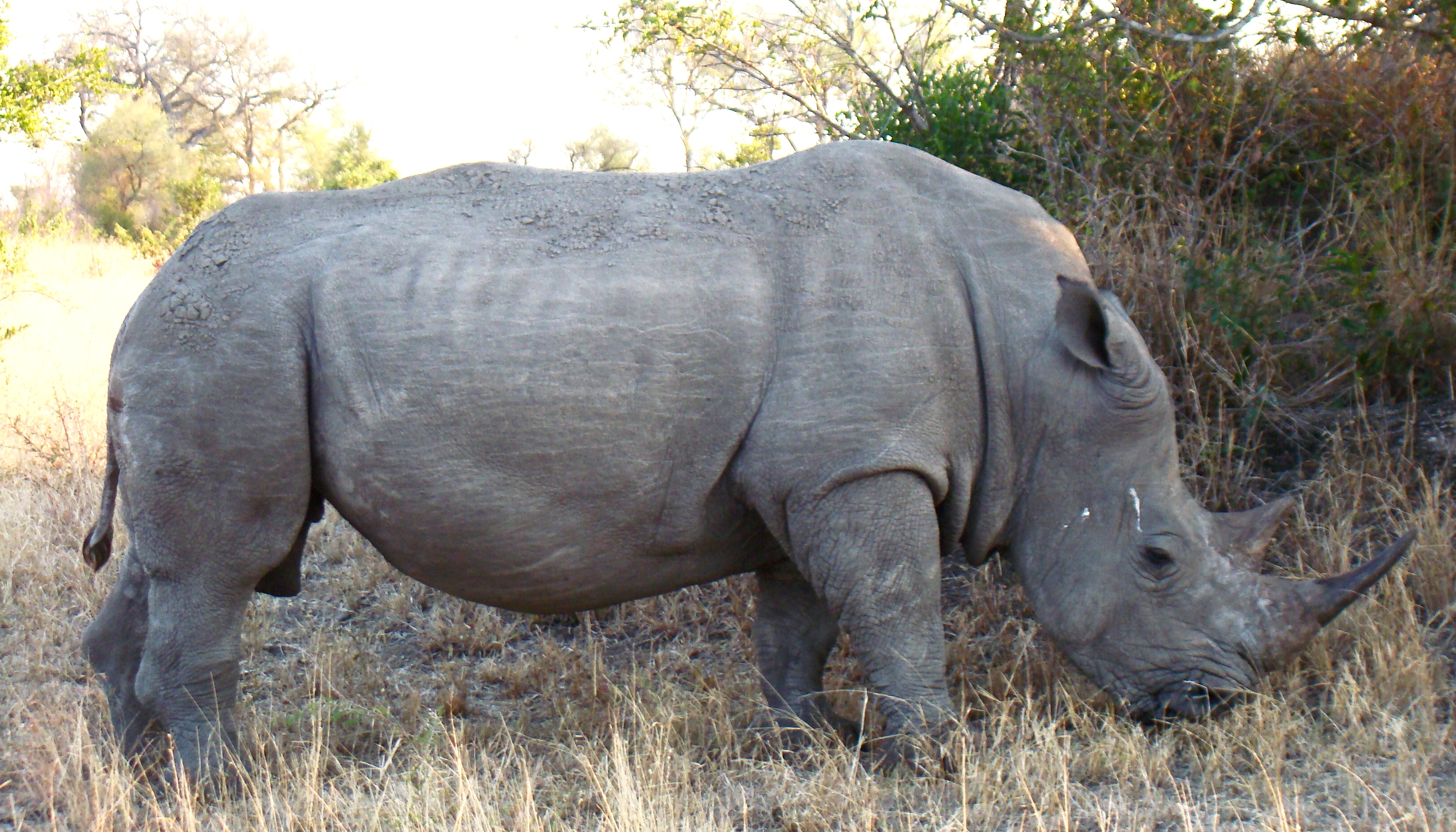 A big male Rhinoceros, photographed in Sabi Sand Private Game Reserve, South Africa.